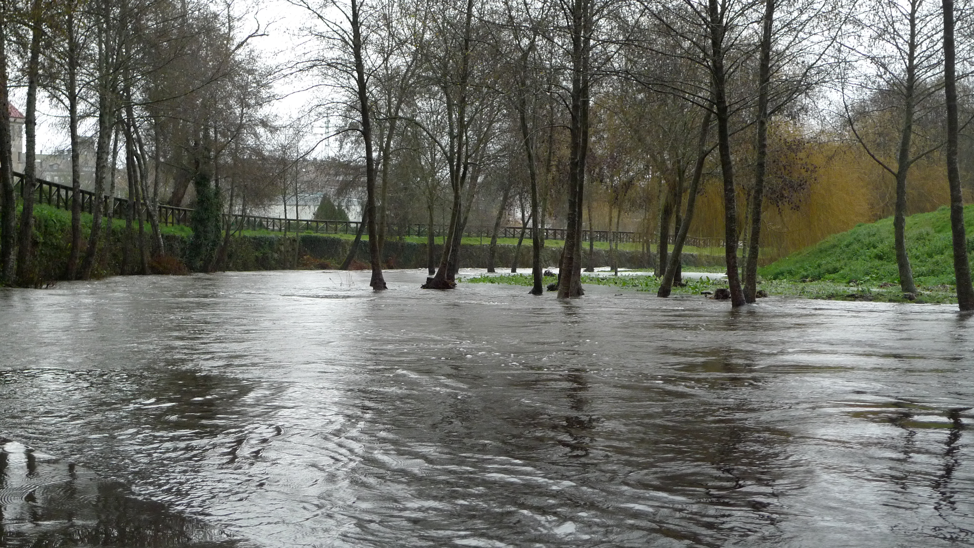 Río Asma cheo o seu paso por Chantada